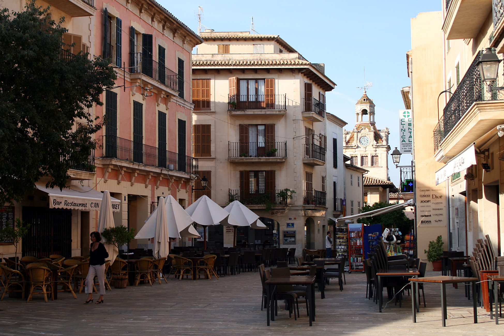 Alcúdia, Mallorca, Spain